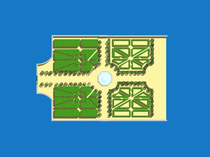 Schloss Hof - 7. Terrasse, Rekonstruktion